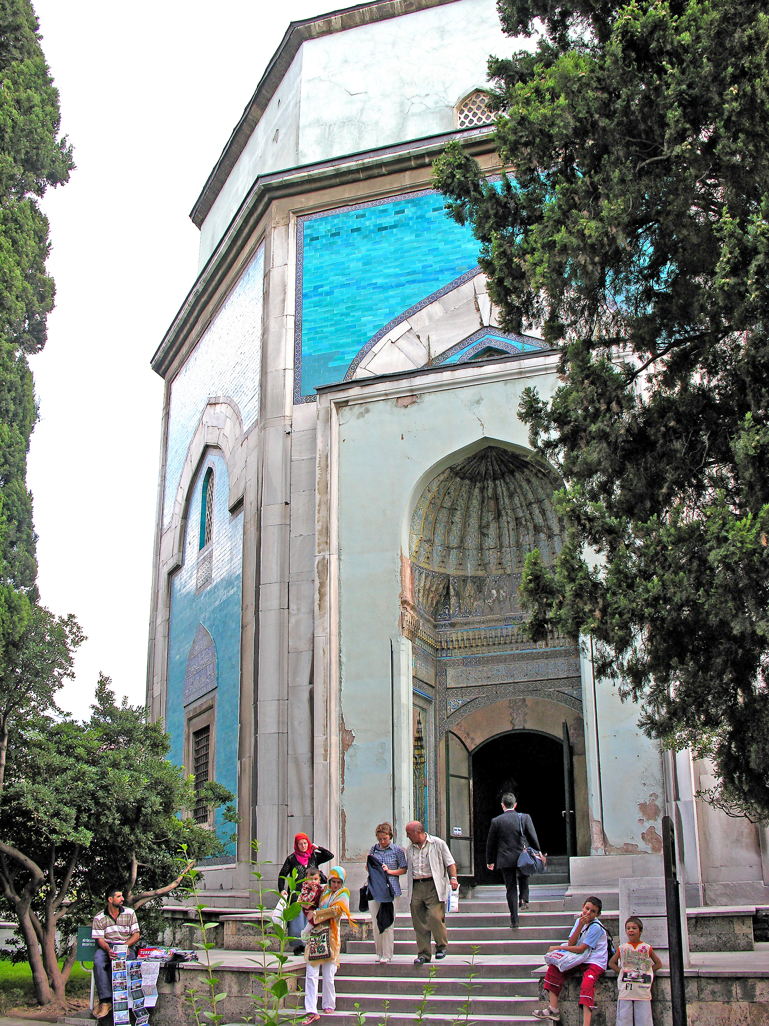 Turkey-1353